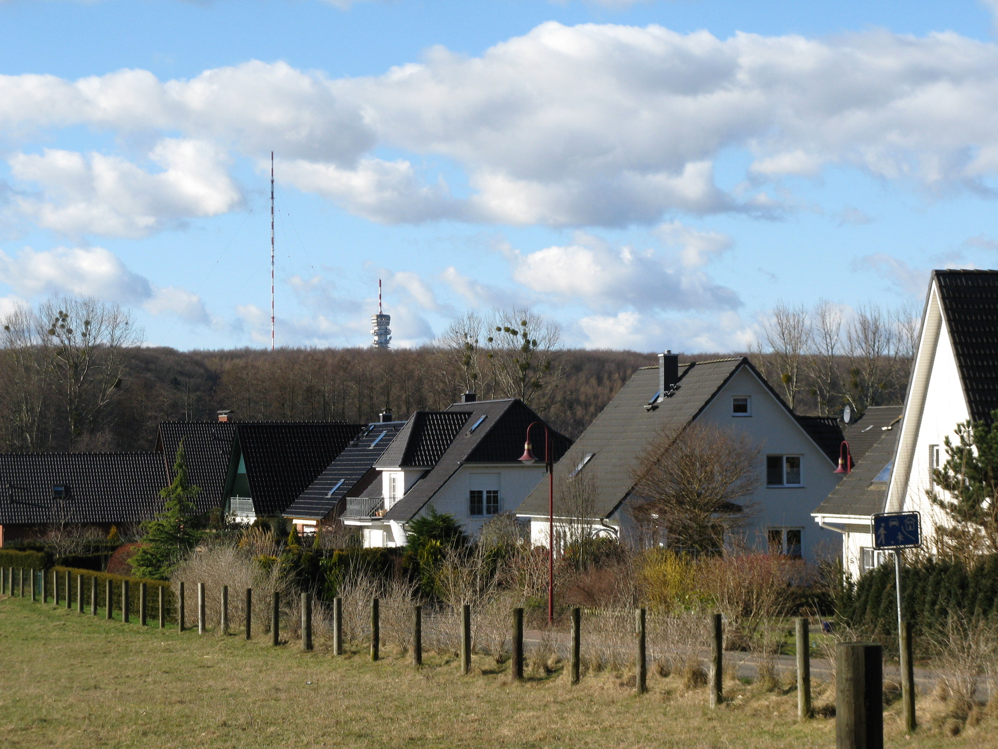 Eigenheime in Raben Steinfeld, Mecklenburg-Vorpommern, im Hintergrund: der Schweriner Fernsehturm mit Sendemast